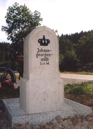 Königlich-sächsischer Meilenstein bei Carlsfeld.